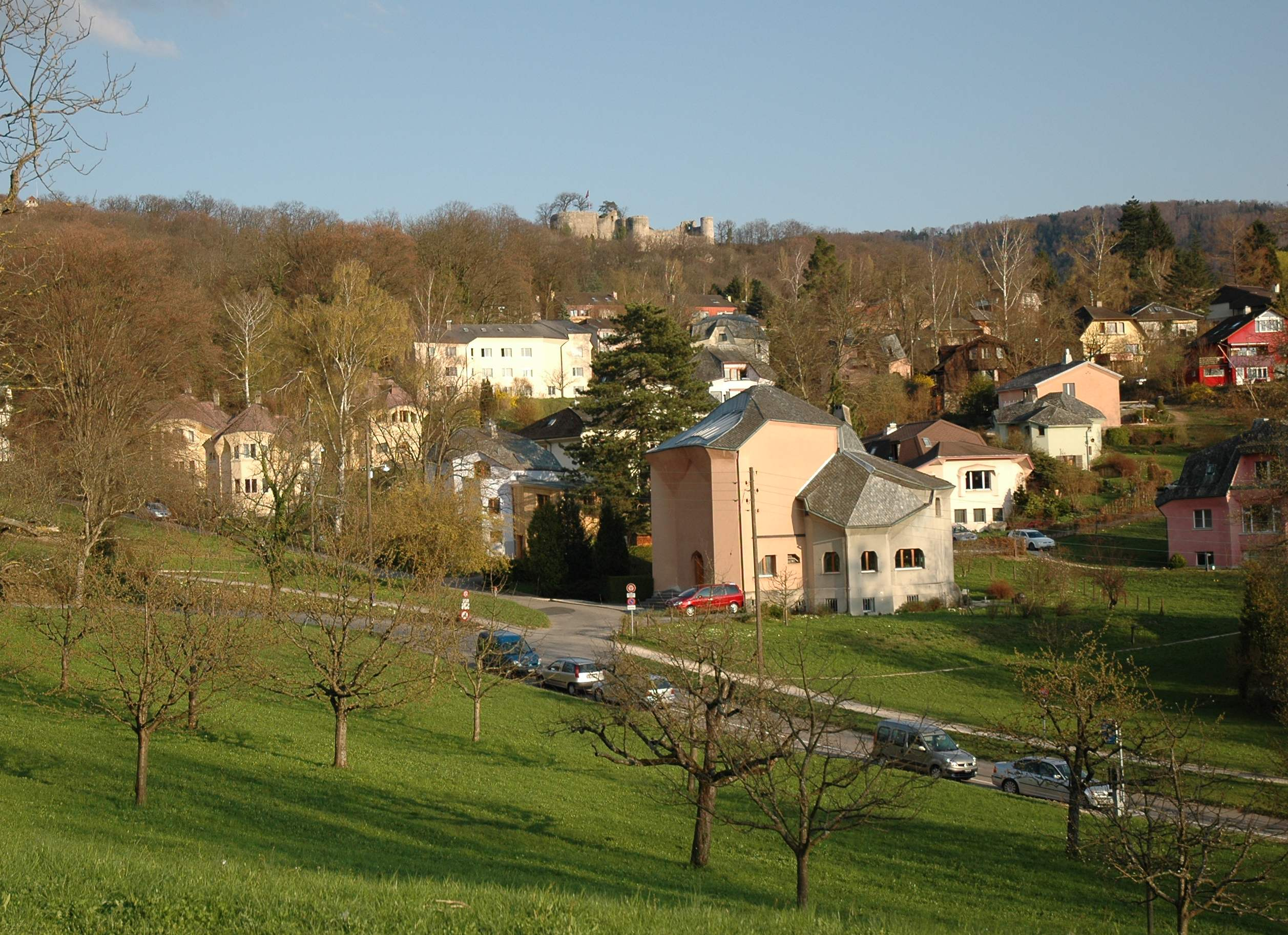 Slottsruinen Dorneck sett fra Goetheanum.